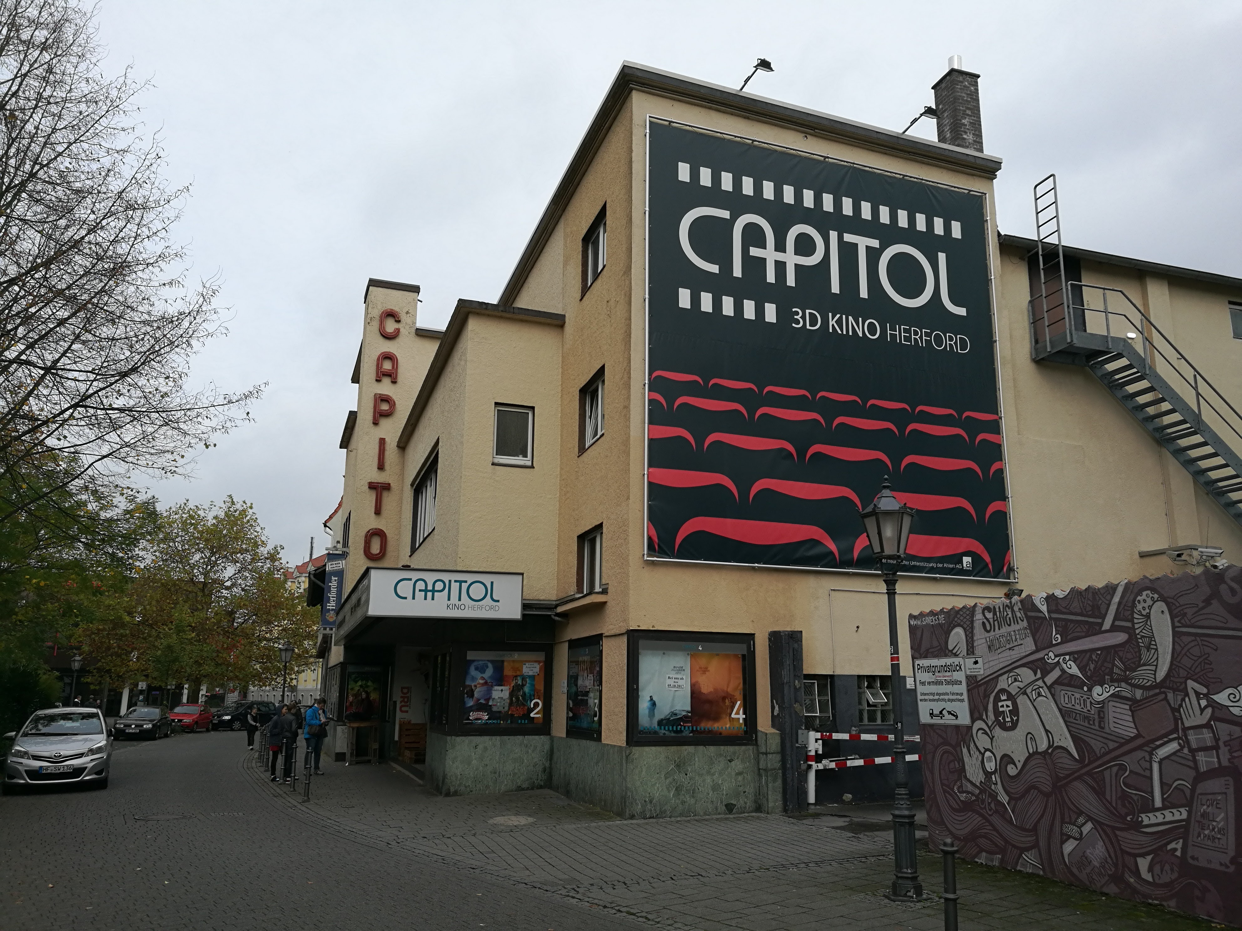 Das Capitol ist das einzige verbleibende Kino in Herford